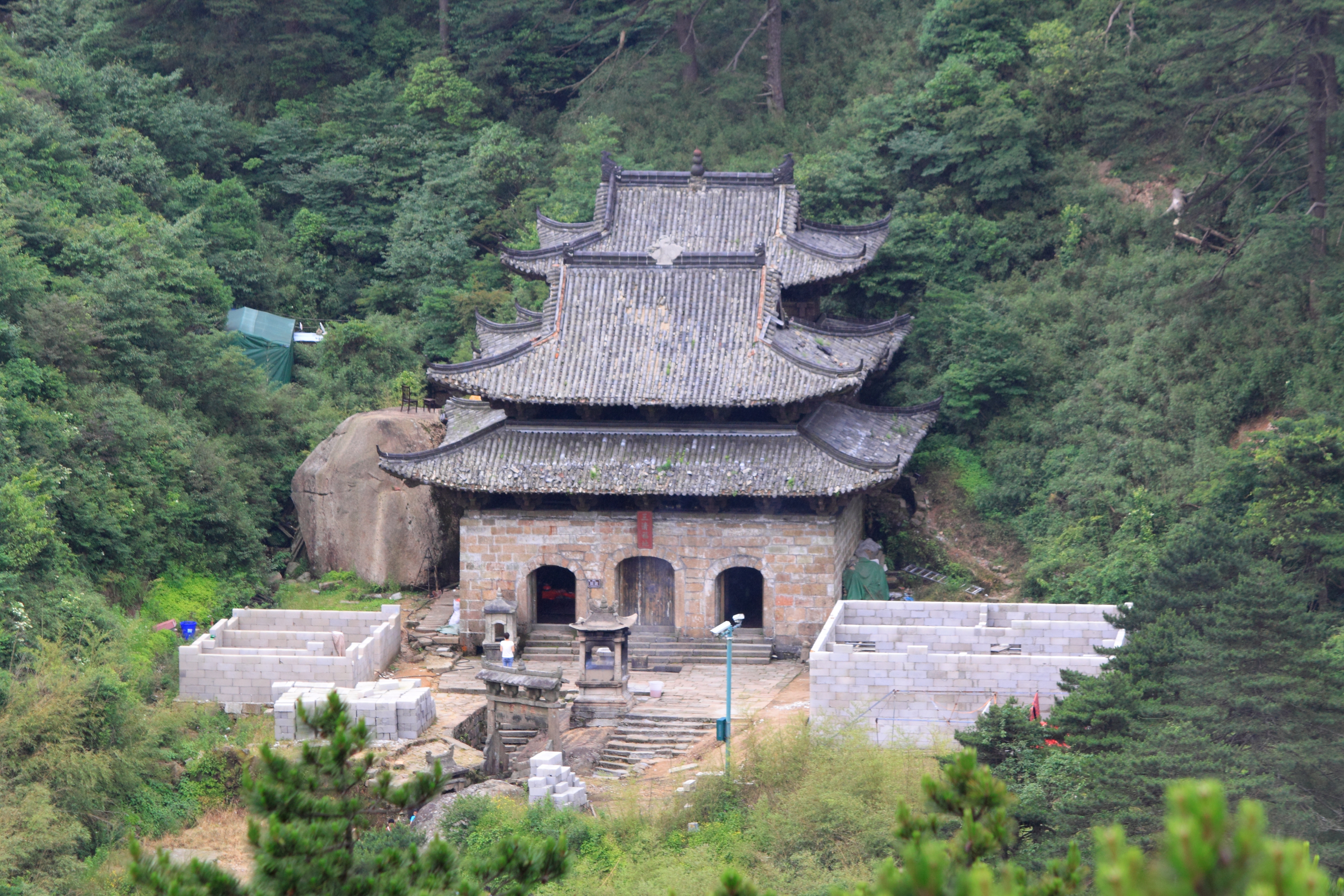 三清山 —— 紫烟石上远眺三清宫